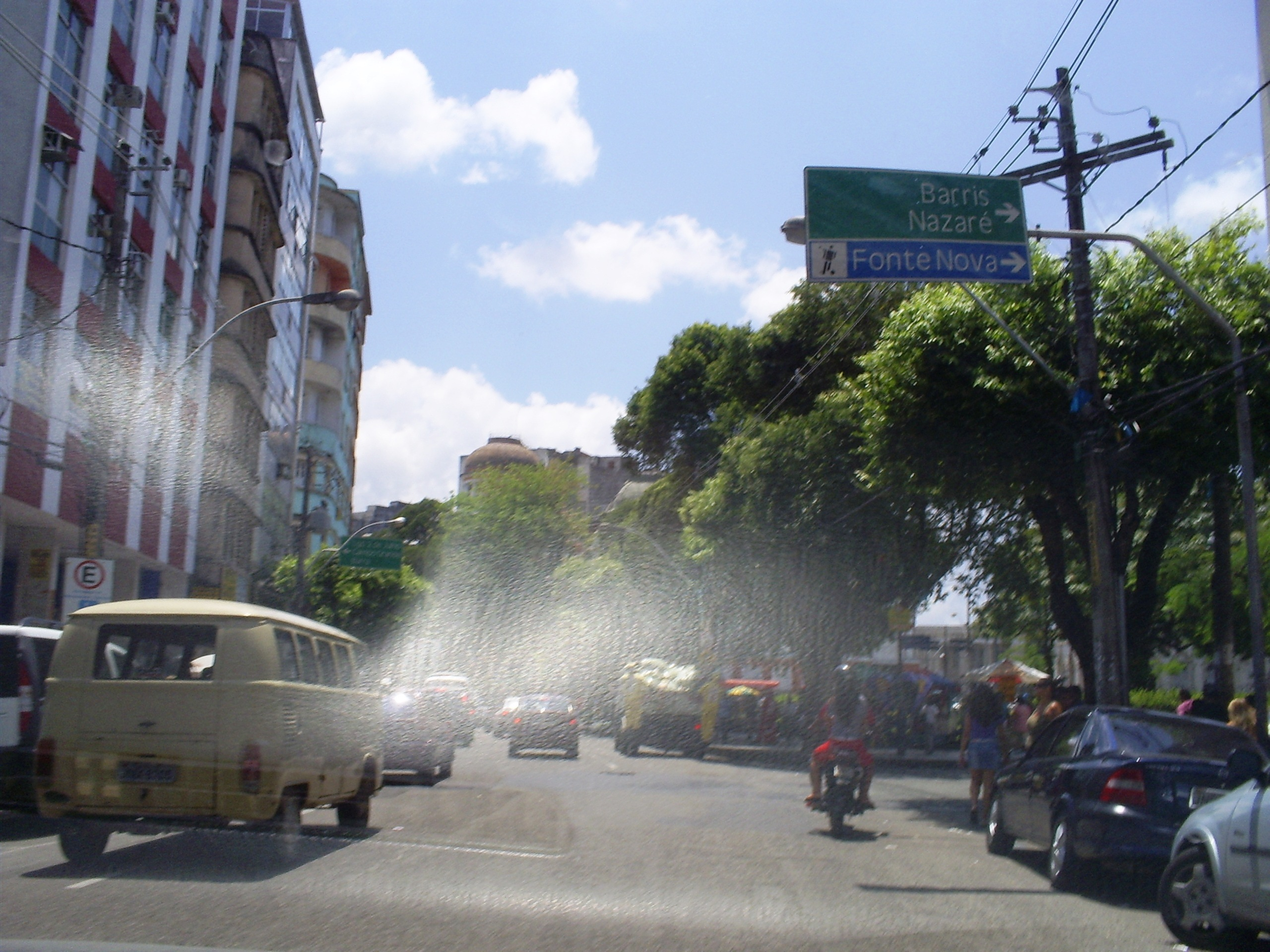 Foto da Avenida Sete de Setembro, Salvador, Bahia, Brasil.